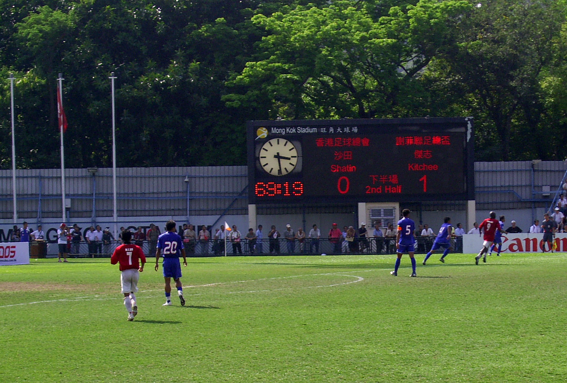 中文（香港）: 2009年香港足總盃:傑志對沙田(旺角大球場)